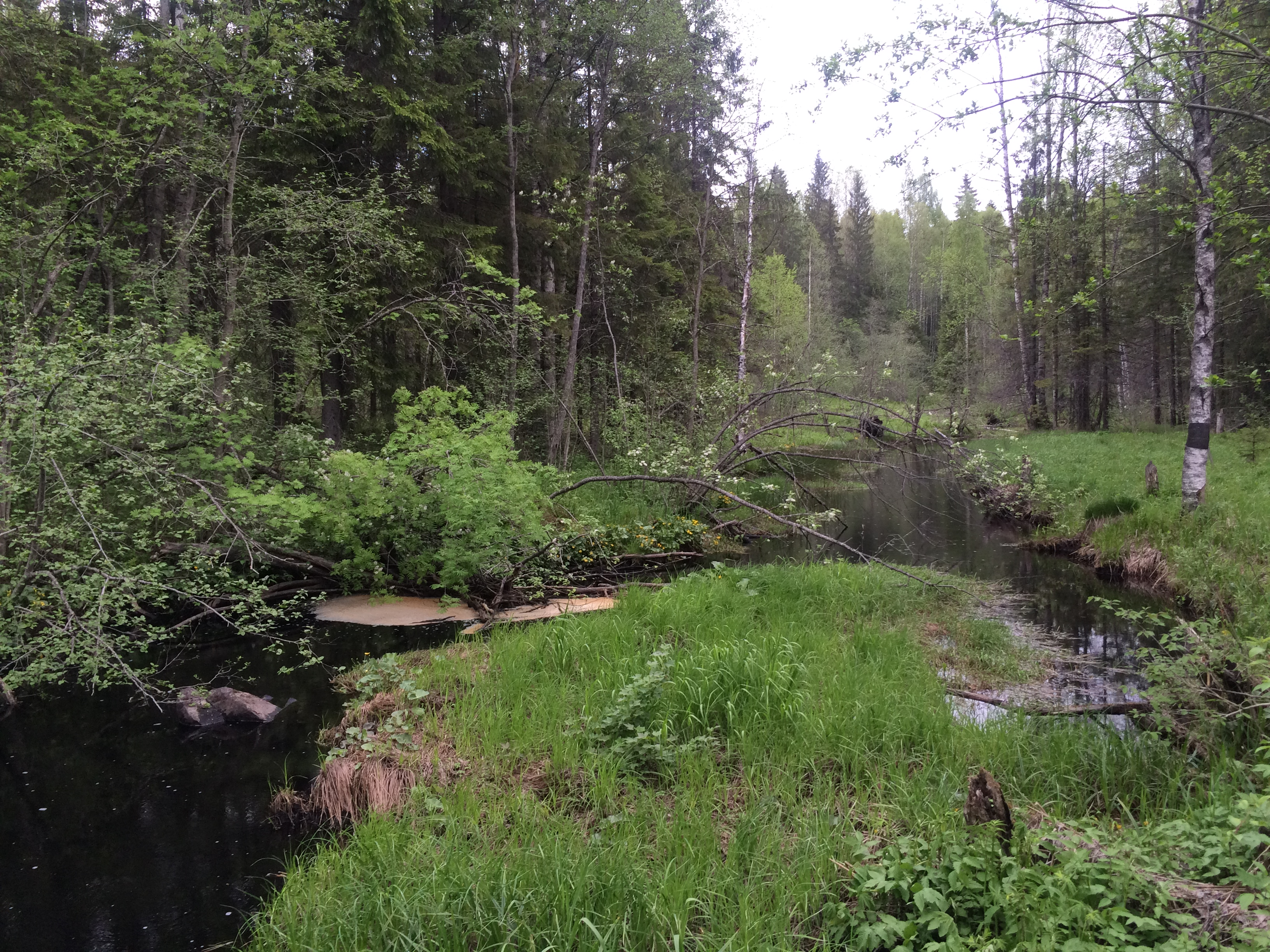 Малая Чевжа